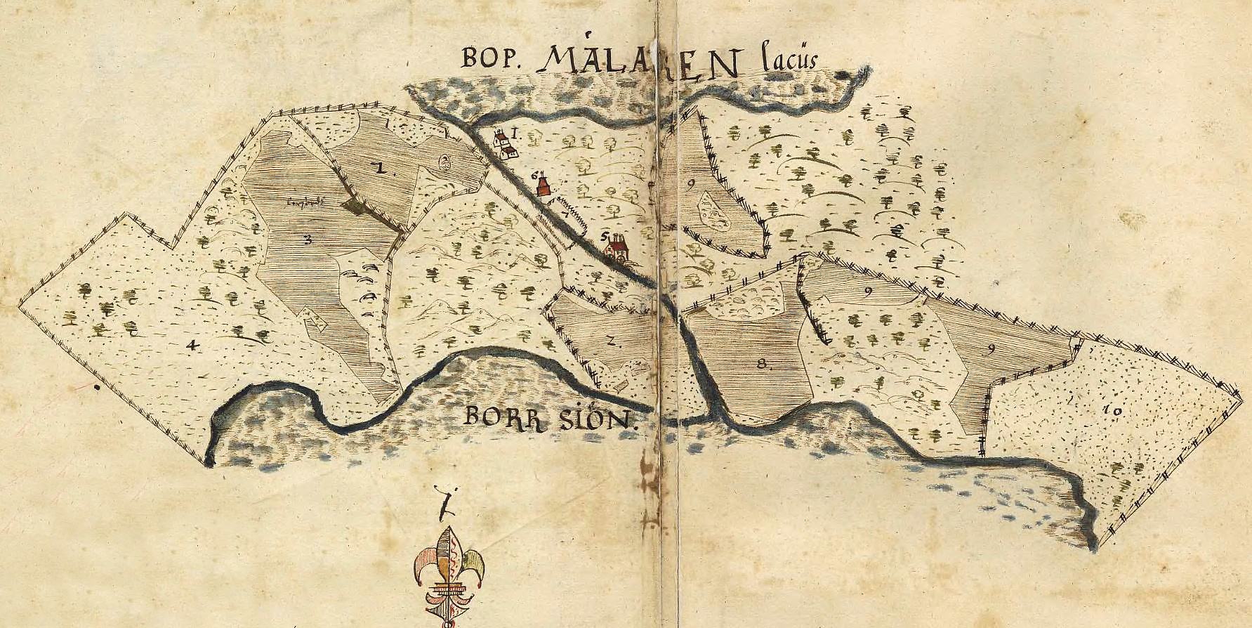 Vällinges ägor 1636. 1 Vällinge gård 5 Hammarsmide 6 Smältugn 7 Trädgården